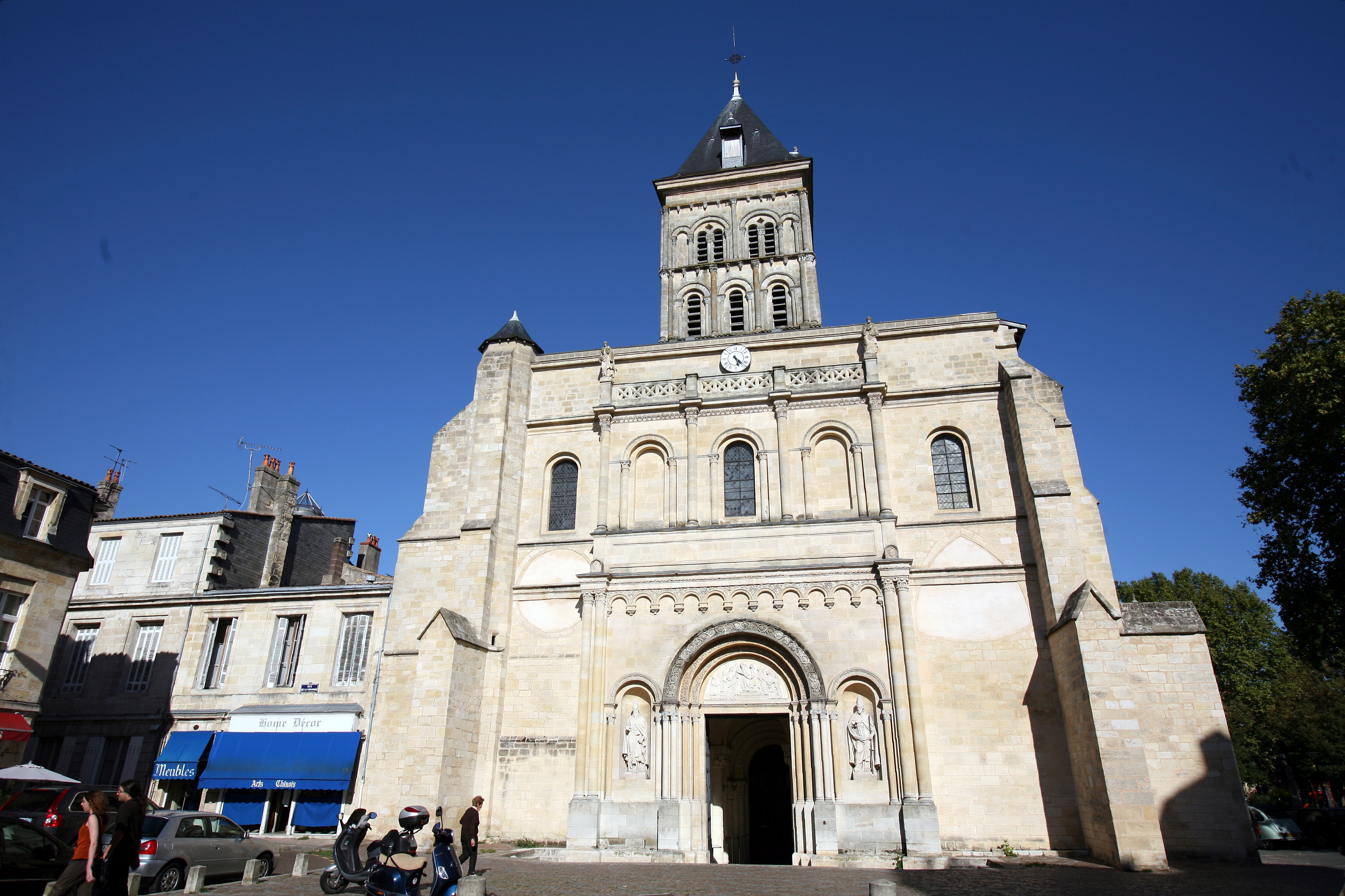 Façade de l'église Saint-Seurin, Bordeaux, France. .